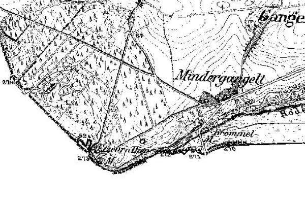 Neuaufnahme 1891-1912